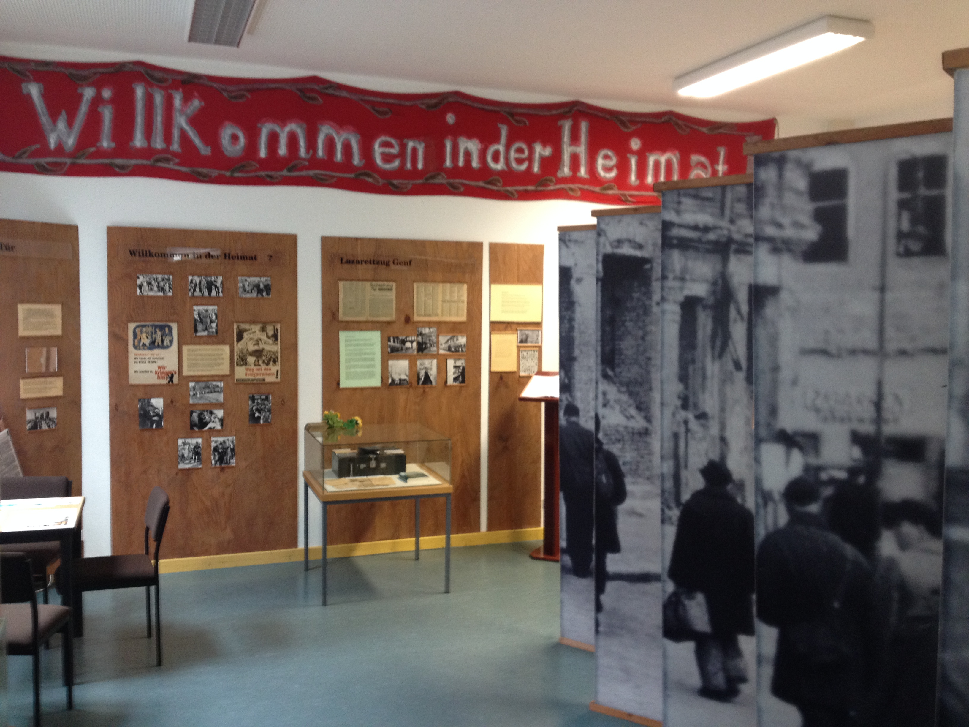 Ausstellung „Willkommen in der Heimat“ in der Hornkaserne